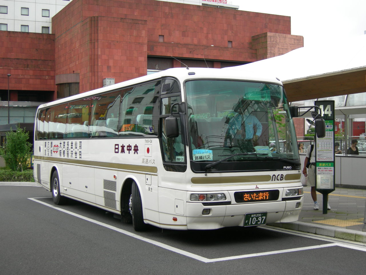 日本中央バス（Nihonchuo bus）三菱ふそうエアロバス（MitsubishiFuso Aerobus）登録番号：練馬200か10-97